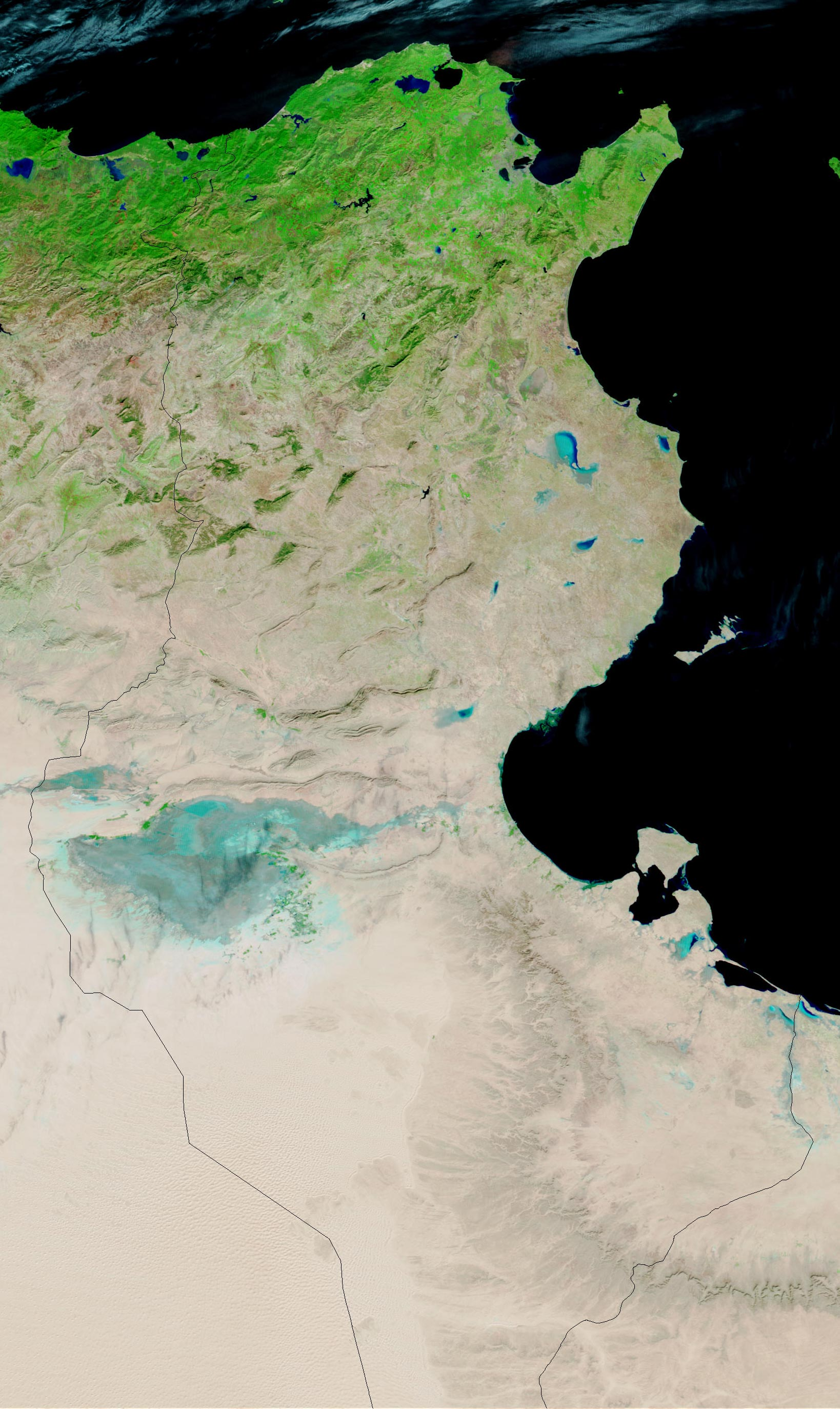 Tunesien, zwischen Mittelmeer und Sahara